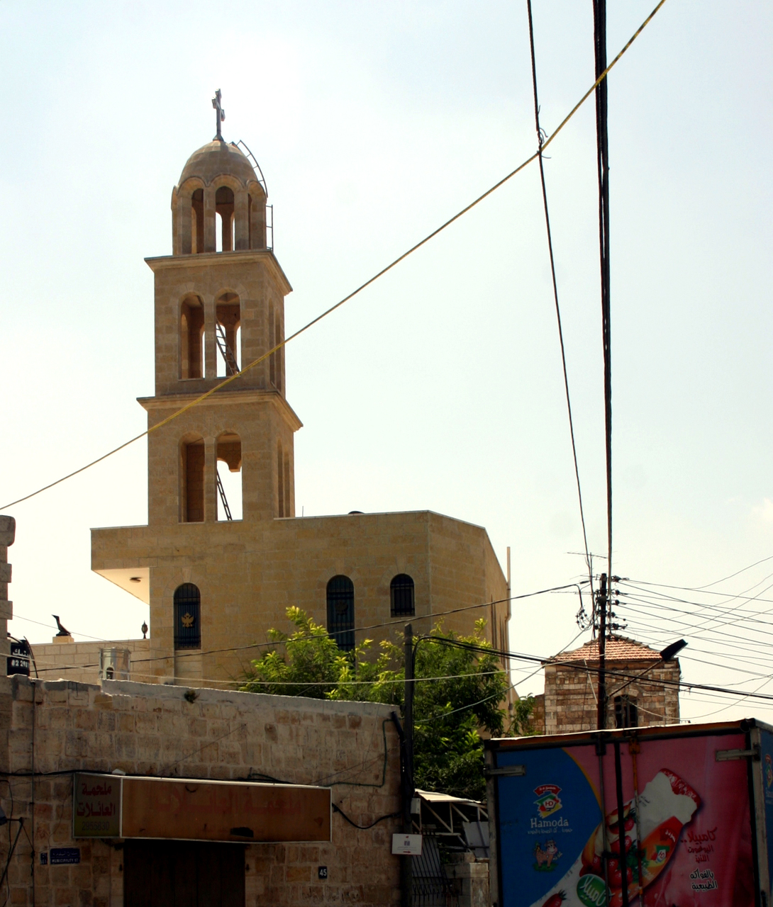 Die griech-orth. Epiphaniaskirche Ramallah in Palästina.